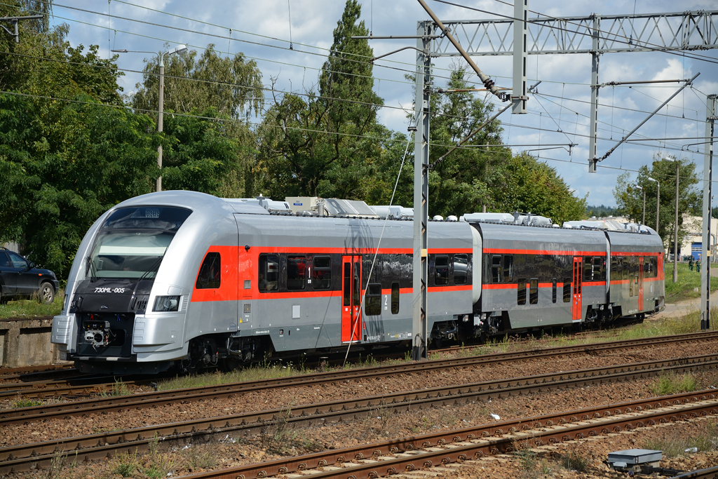 Spalinowy zespół trakcyjny Pesa 730ML-005